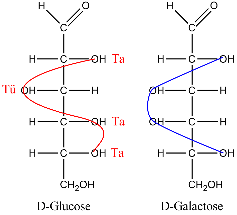 Analogie zur "TaTüTaTa"-Eselsbrücke und Signete zum Aufbau von Glucose und Galactose.